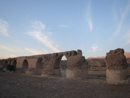 پل كشكان دوره ساساني